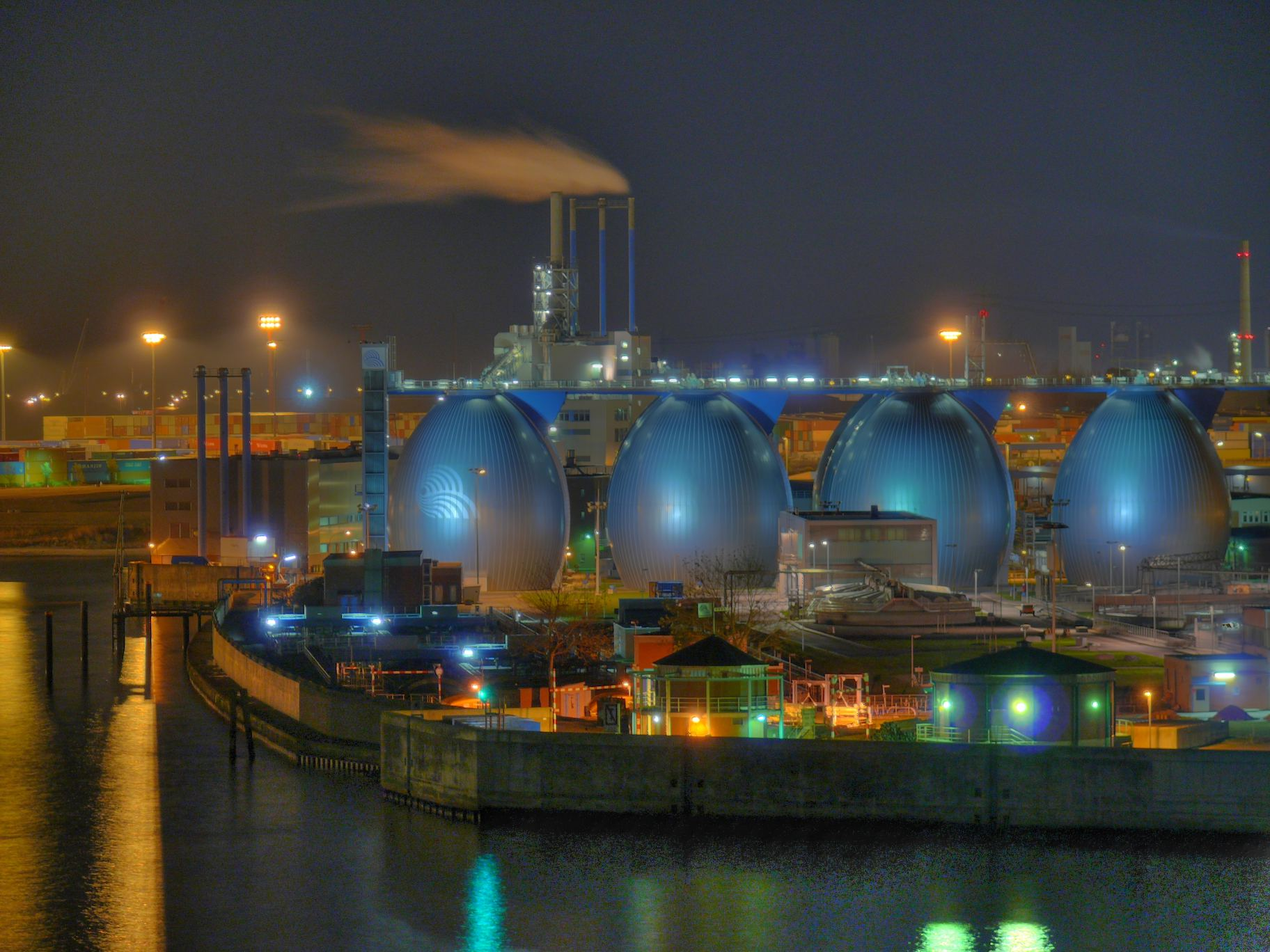 Hauptklärwerk Köhlbrandhöft, HamburgEggs?